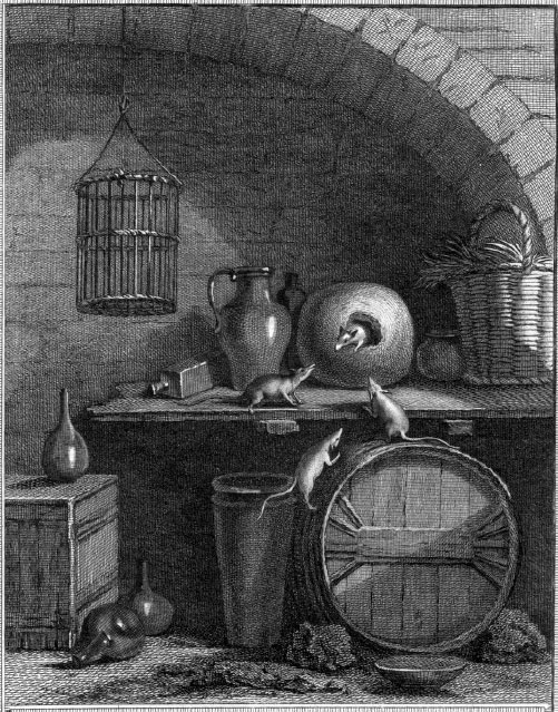 Le rat qui s'est retiré du monde (La Fontaine VII, 6) Illustration d'un ouvrage de 1756 (Google Books)